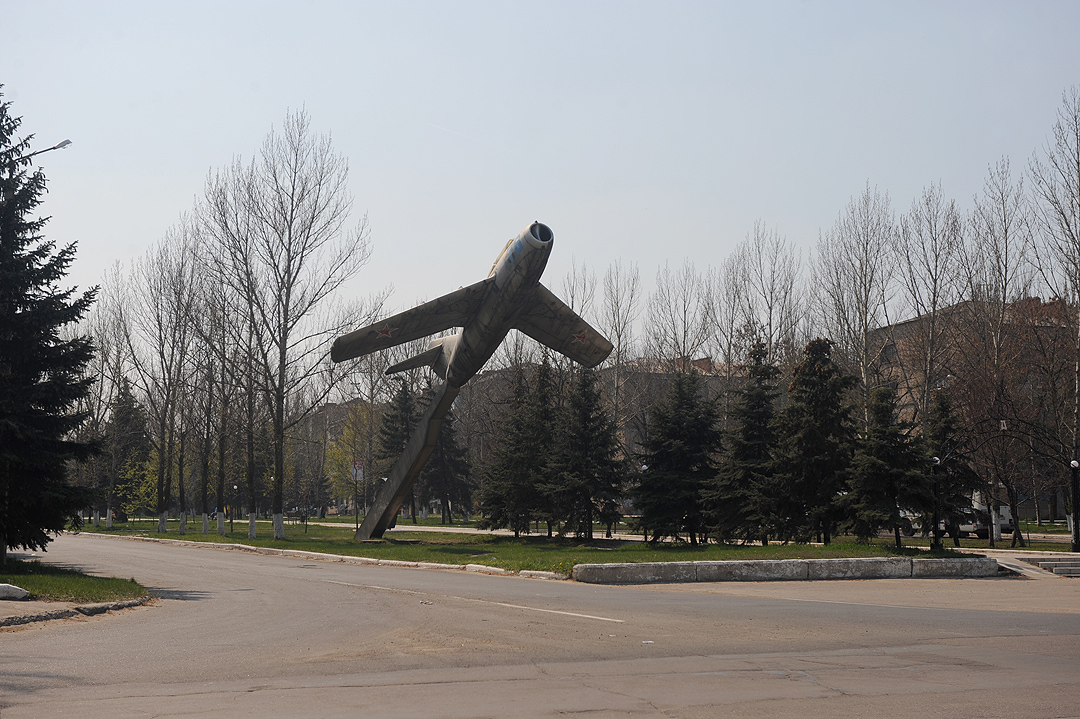 Дружковка. УТИ МиГ-15 (в народе - "малый самолет") Установлен в 1977 году на проспекте Космонавтов в честь 50-летия ДОСААФ и курсантов Дружковской школы ОСОАВИАХИМа.